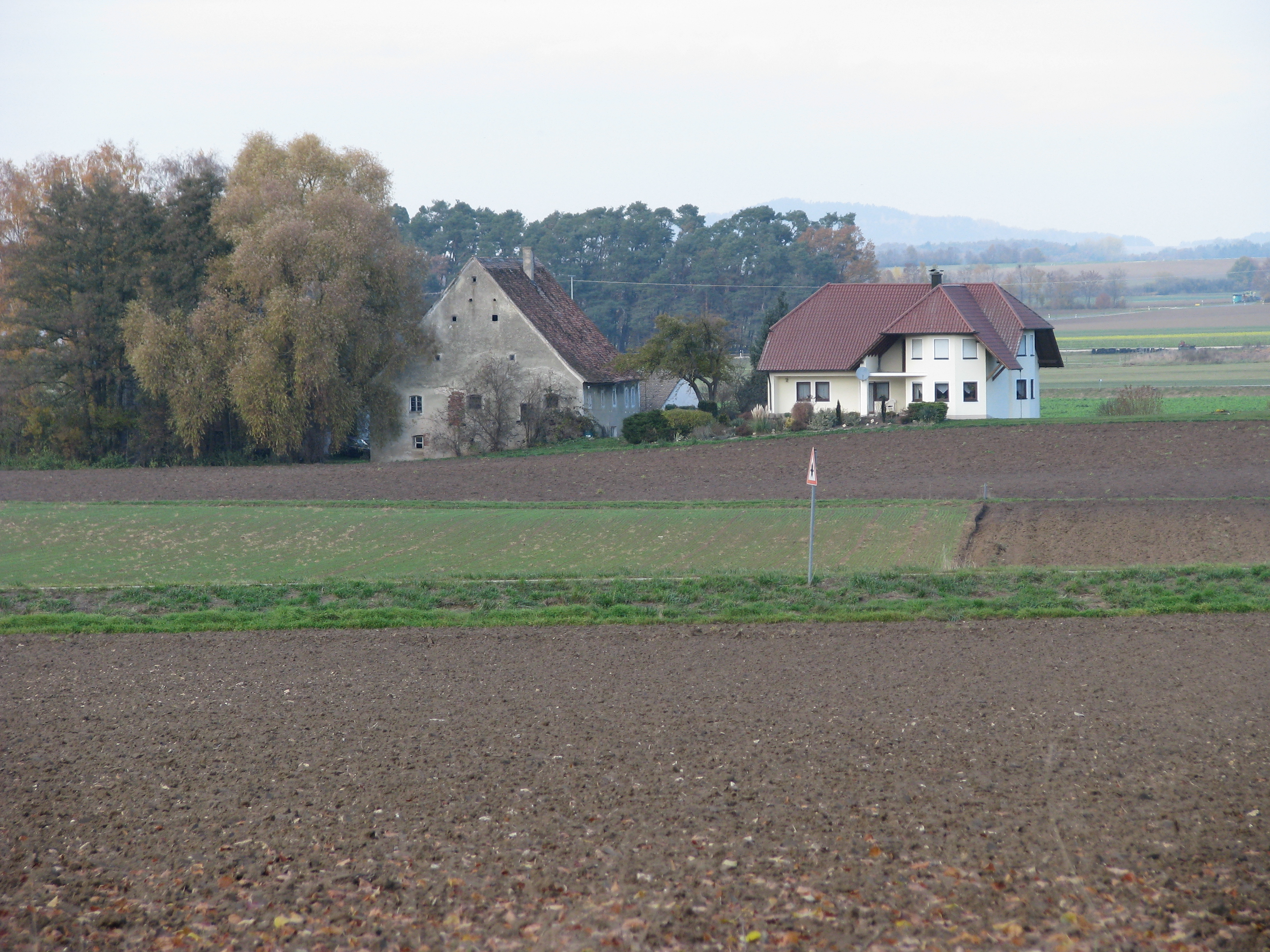 Burggriesbach, Ortsteil von Freystadt im Landkreis Neumarkt in der Oberpfalz in Bayern, Schneemühle